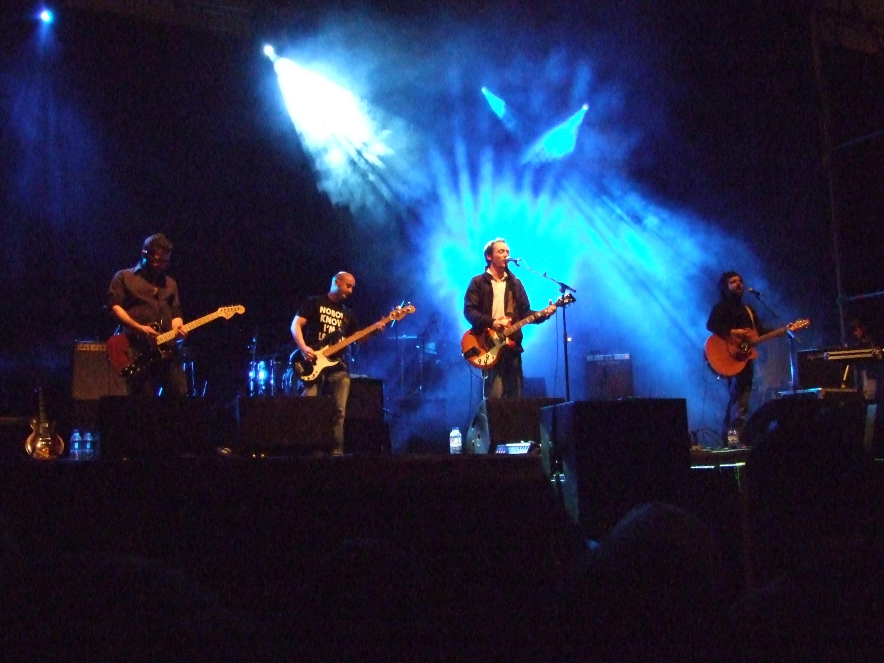 Foto de Love Of Lesbian en concierto, L'Hospitalet 19 Marzo de 2008